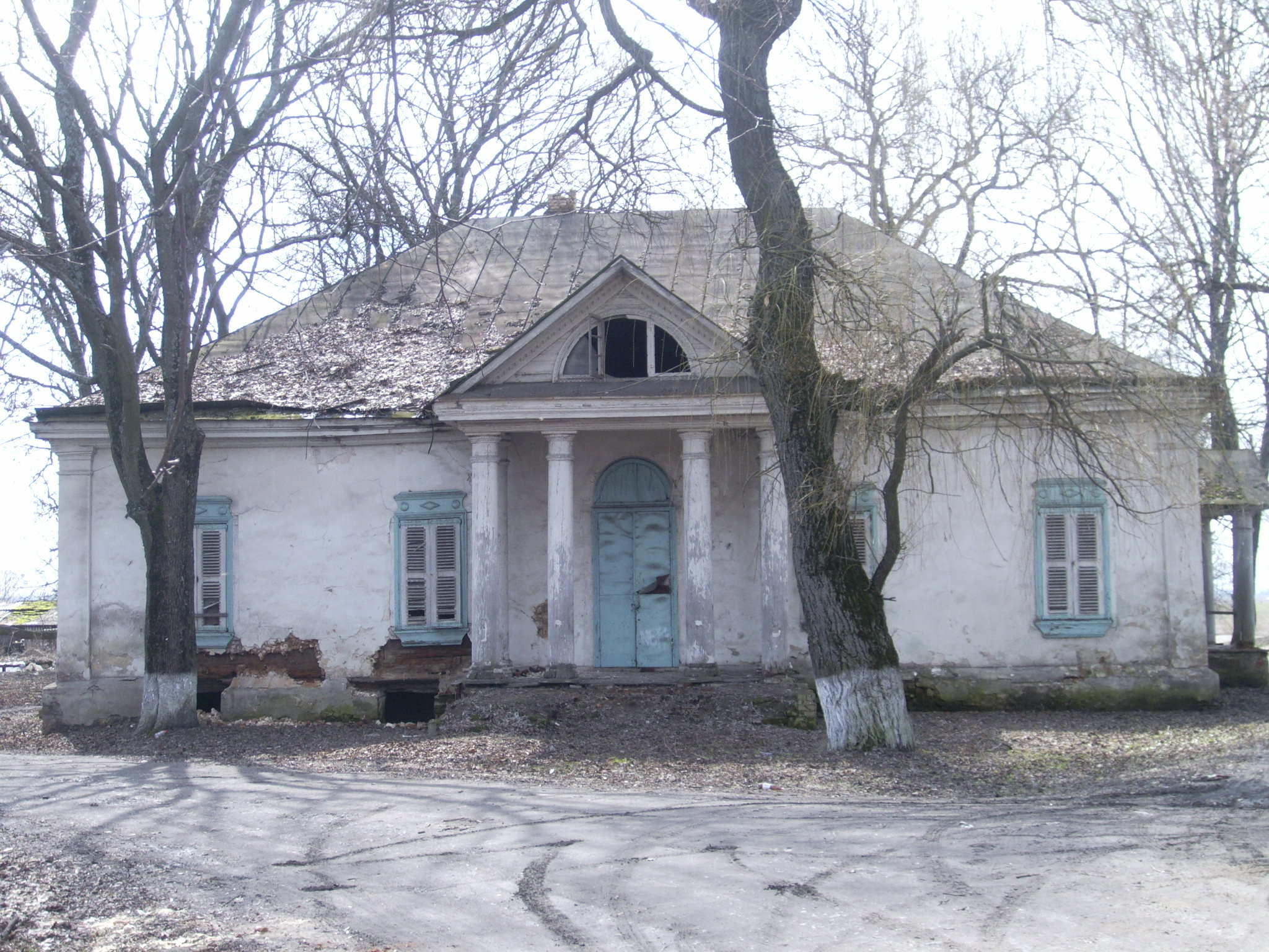 Покорщина. Панський будинок (фасад).